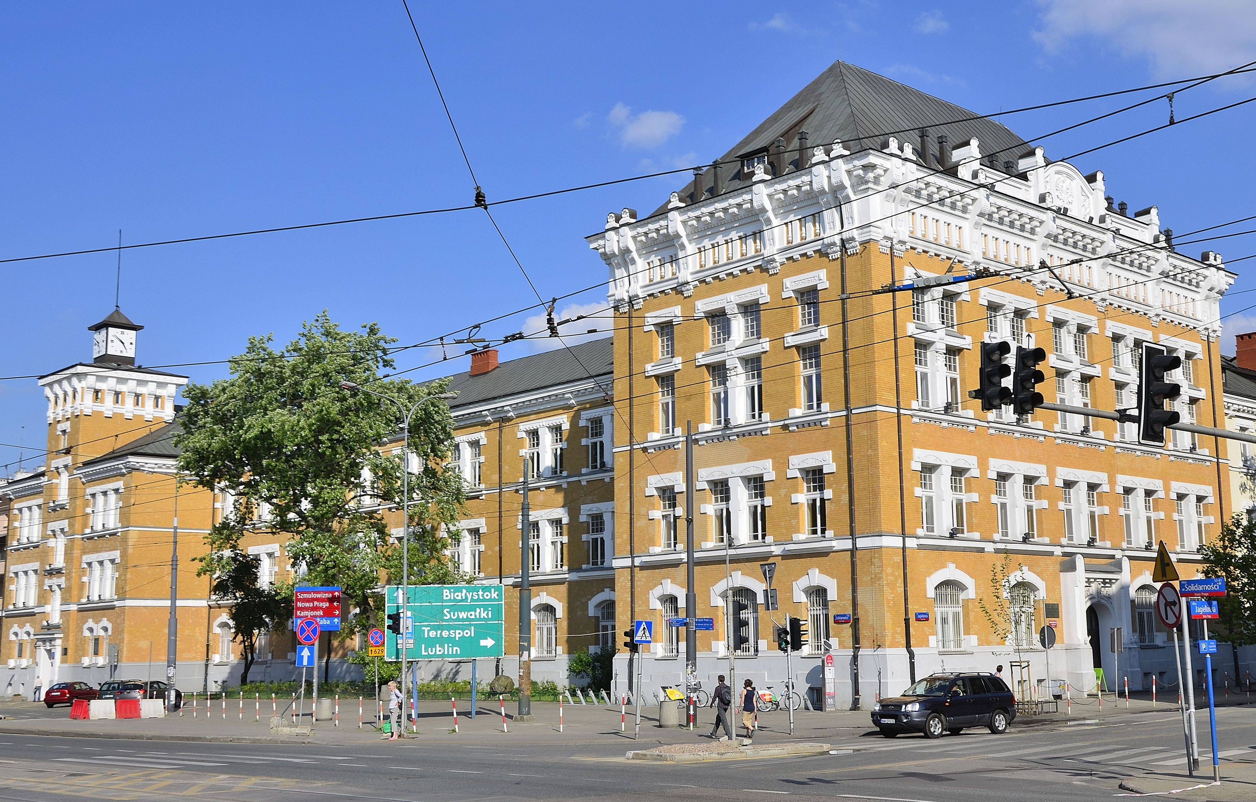 Liceum im. Władysława IV w Warszawie